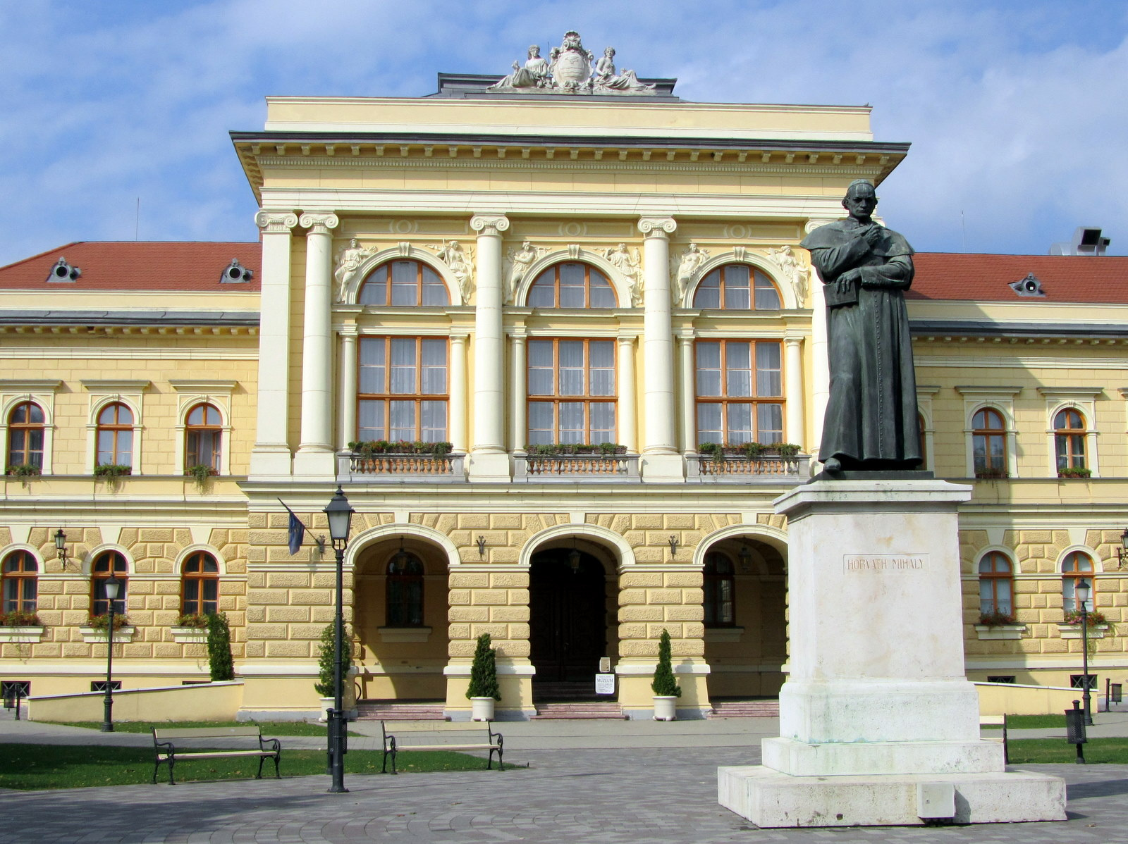 Megyeháza (Szentes, Kossuth tér 1.) This is a photo of a monument in Hungary. Identifier: 3538